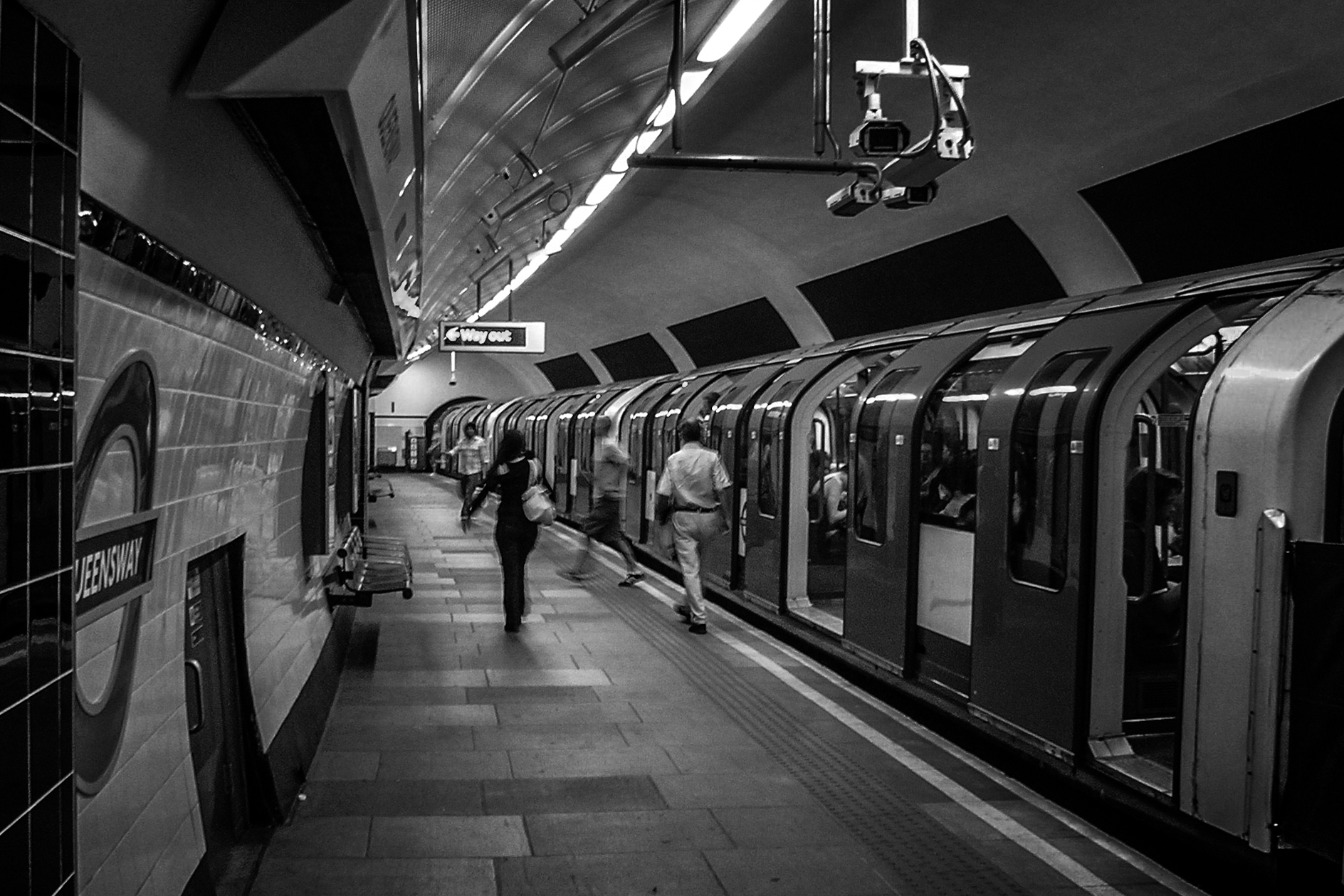 Queensway Underground Station